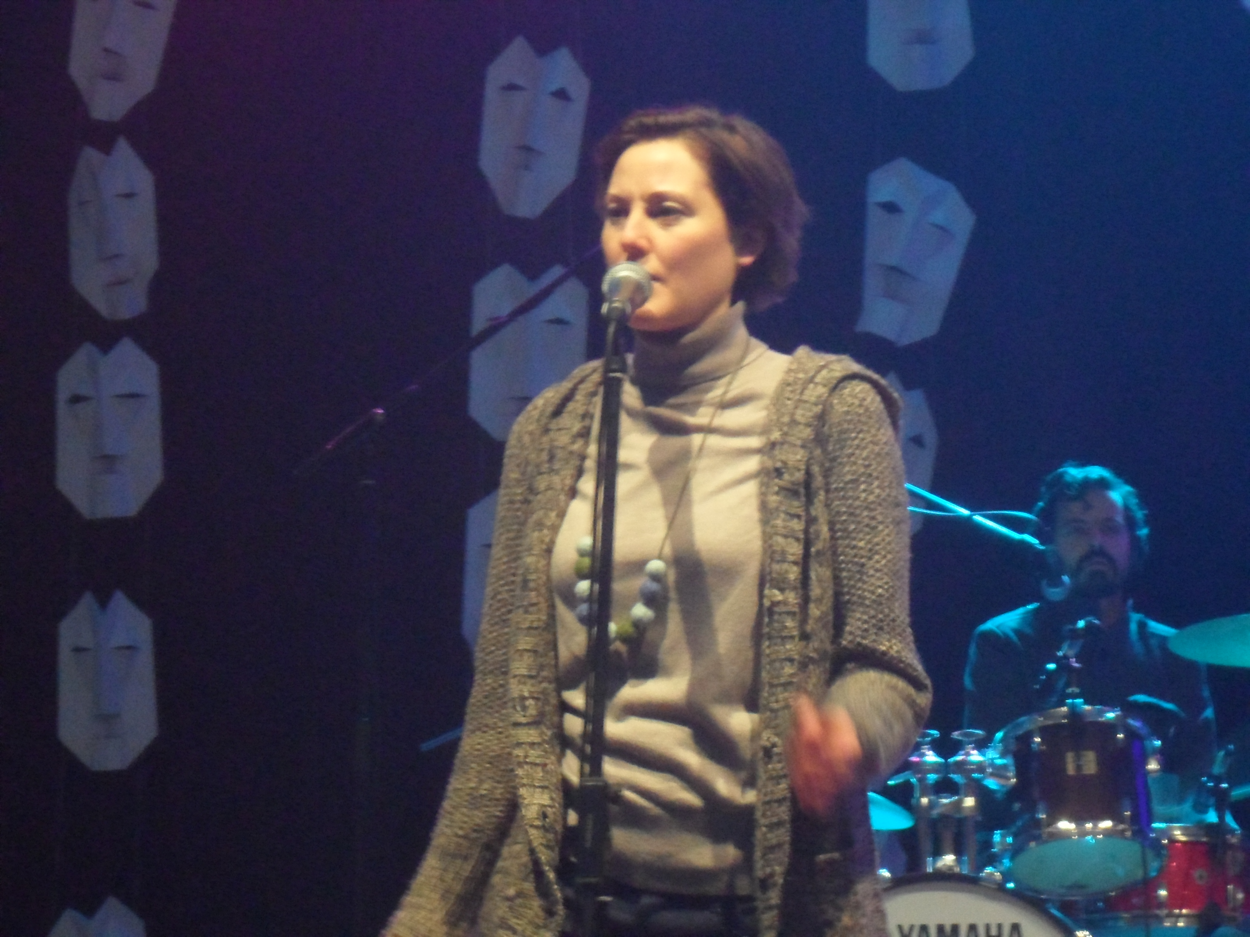 Protestival - Brina Vogelnik. -- Na četrti vseslovenski vstaji se je zbralo okoli 5000 ljudi. Kot je poudaril odbor Vseslovenske ljudske vstaje, je osnovna zahteva protestnikov, odstop političnih elit, ostala neizpolnjena. Protestniki so zato v obliki t.i. Pomladne deklaracije vseslovenske ljudske vstaje zahtevali razpis predčasnih volitev v roku šestih mesecev od imenovanja prehodne vlade, na čelu prehodne vlade pa osebo z nesporno moralno integriteto. Prav tako so zahtevali instrument ljudske nezaupnice in radikalno reformo sodstva, pa tudi takojšnje in učinkovito sojenje vsem, ki so do premoženja prišli na sporen način, in tudi, da bankirji prevzamejo odgovornost. Zahtevali so tudi prenovo Slovenije, ki bo temeljila na morali in socialni pravičnosti, večji vpliv ljudi na to, kdo bo sedel v DZ skozi preferenčni glas ter ustanovitev ustavne komisije, ki bo vključevala državljane in uveljavila potrebne spremembe v ustavi.